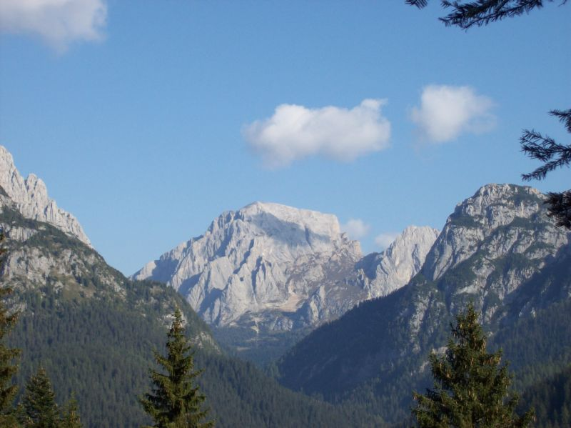 Monte Peralba visto dal Rifugio Siera